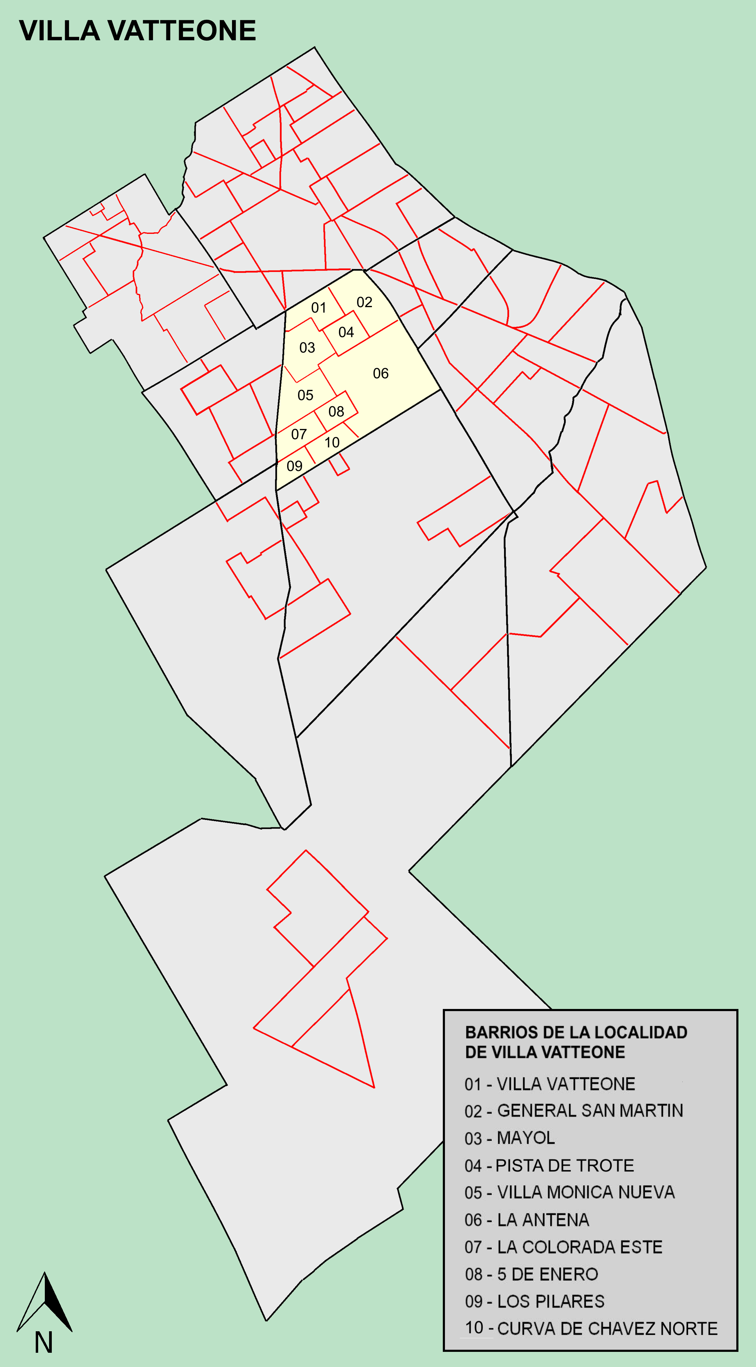 Mapa barrios de Villa Vatteone